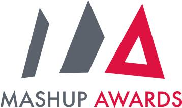 Mashup Awardsのロゴ